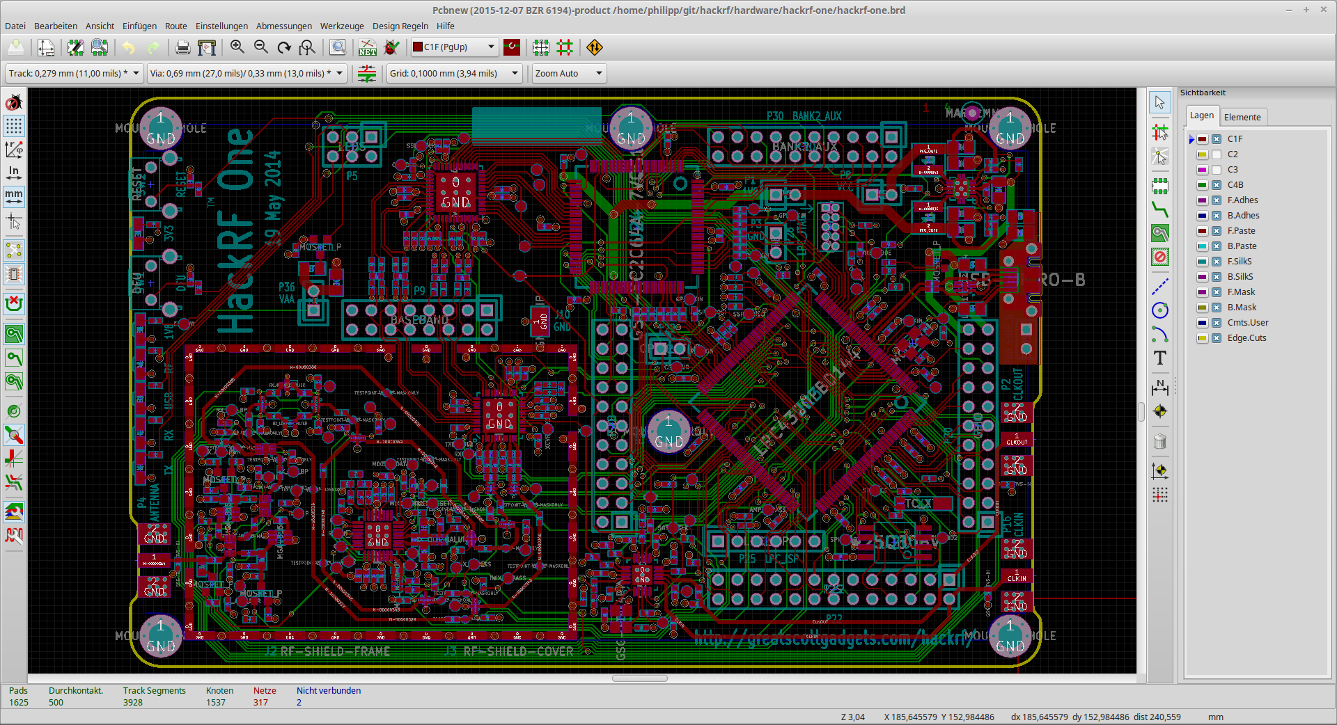 deutsches Interface von Pcbnew (Teil von KiCad 4.0.0). Die geöffnete Datei ist das Hackrf One-Projekt (Open Source Hardware)